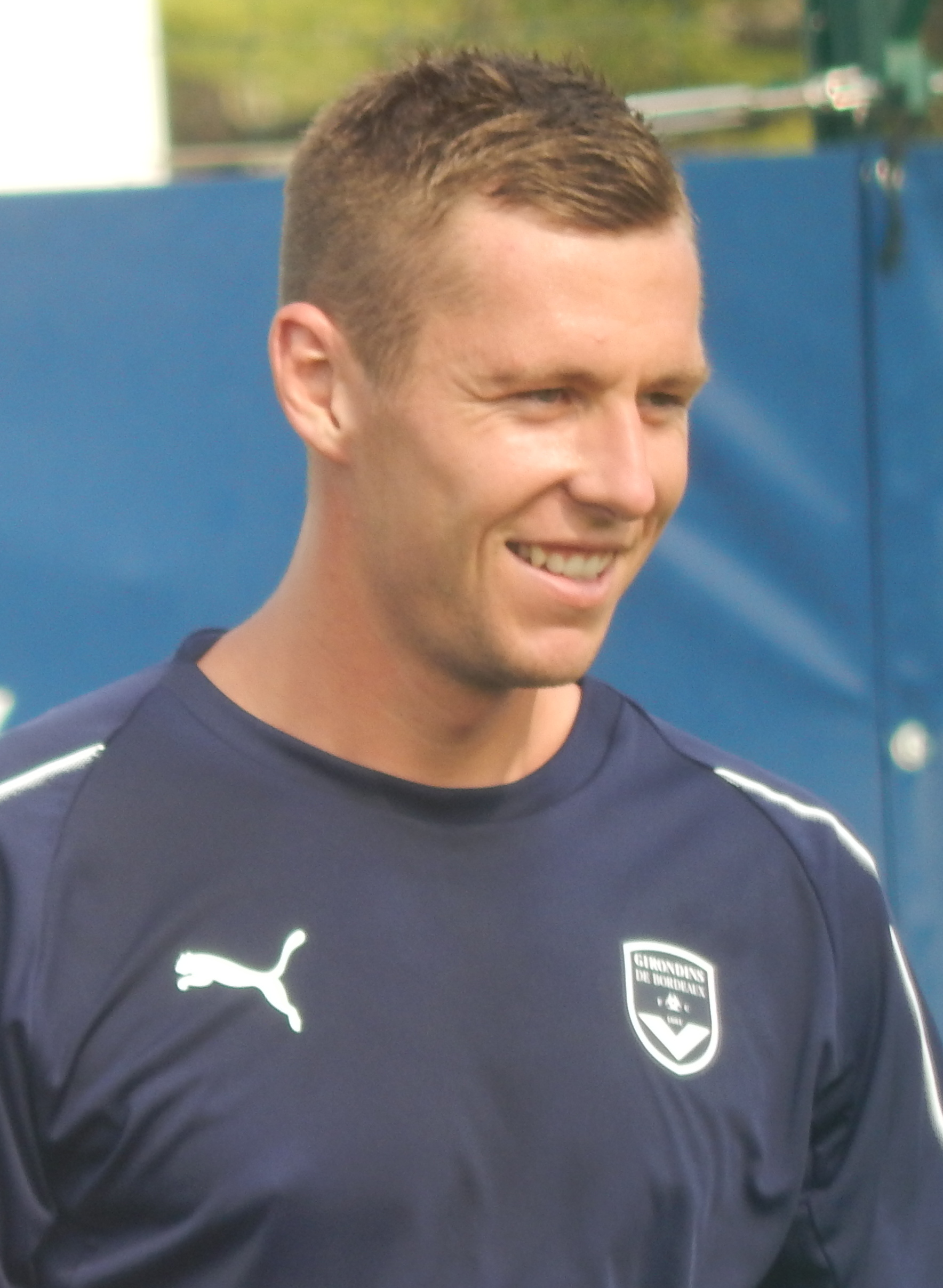 Lukas Lerager à l'entraînement avec les Girondins de Bordeaux le 19 juillet 2018.